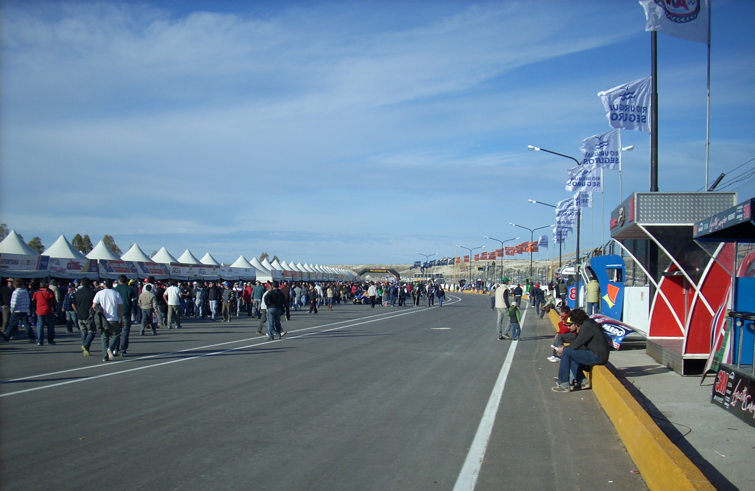 Vista del Autódromo Mar y Valle en el TC del 2010